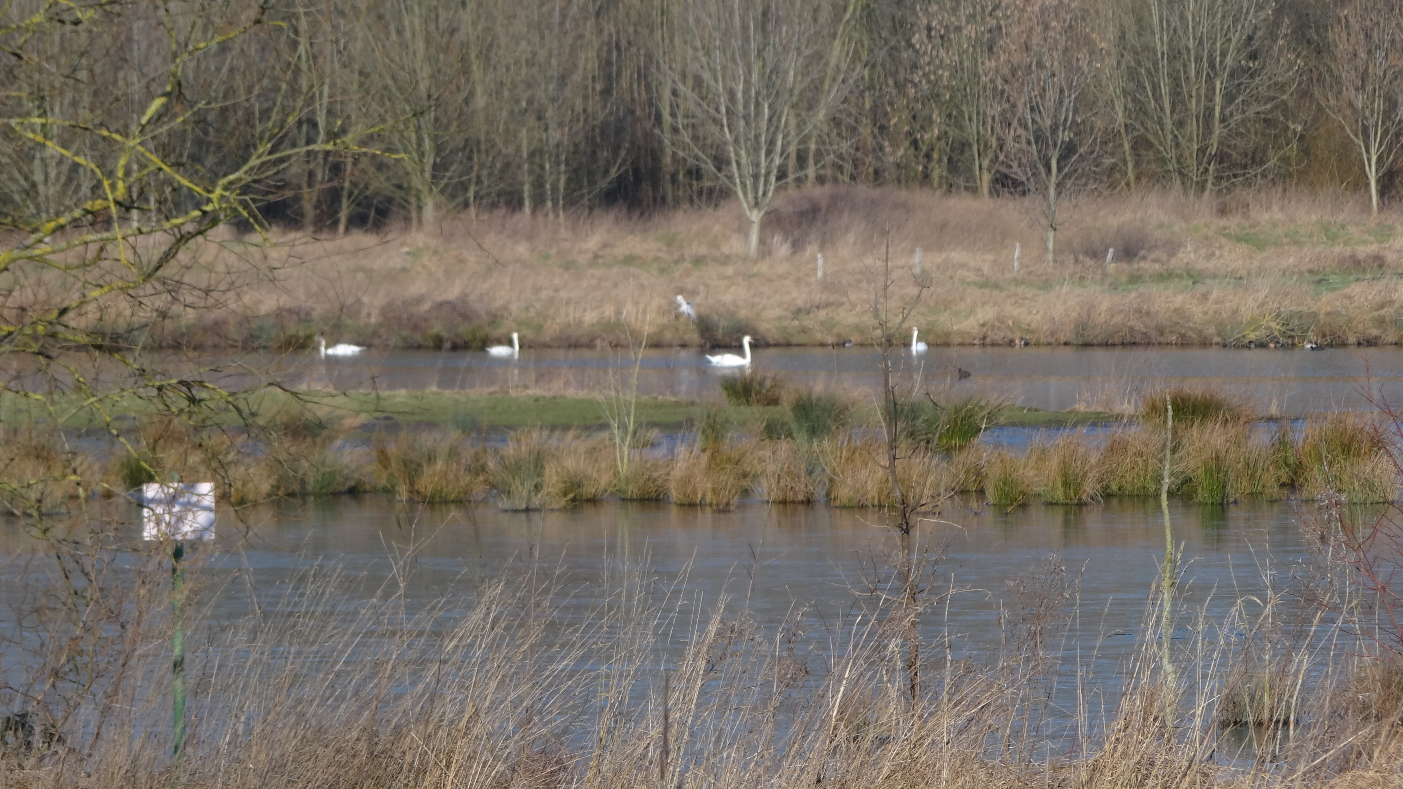 Hamm, Germany: Schwäne auf den Teichen der Lippeniederung bei der Straße Am Tibaum